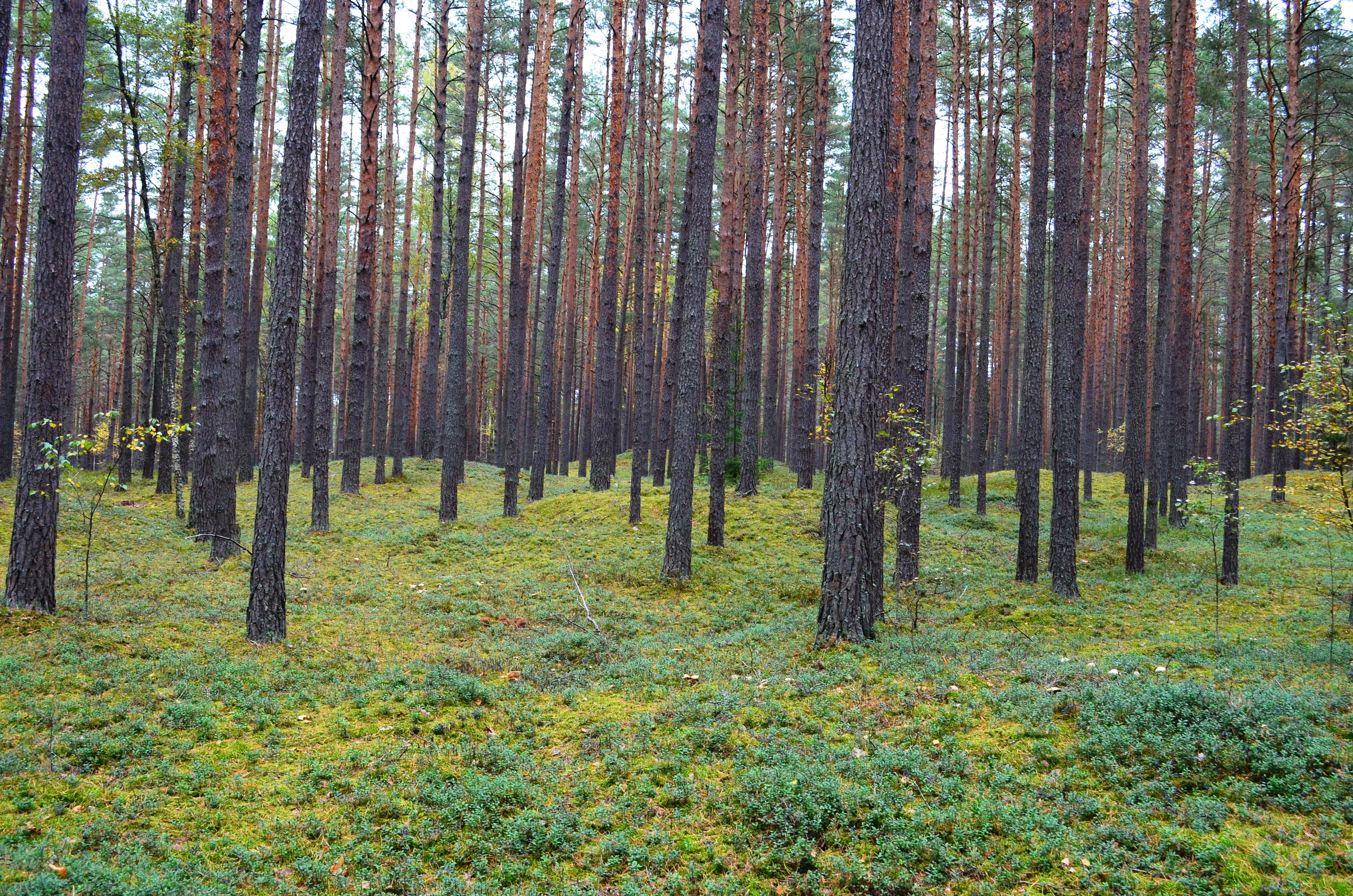 Palūšės pilkapynas (II), Ignalinos raj.